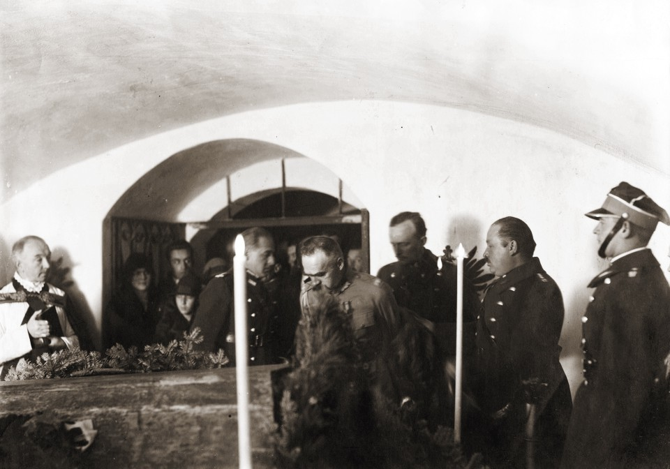 Marszałek Józef Piłsudski dekoruje orderem Virtuti Militari IV klasy sarkofag ze zwłokami swego adiutanta, Stanisława Radziwiłła, poległego w 1920 r. Nieśwież, kościół farny, krypta grobowa Radziwiłłów, 25.X.1926 r.